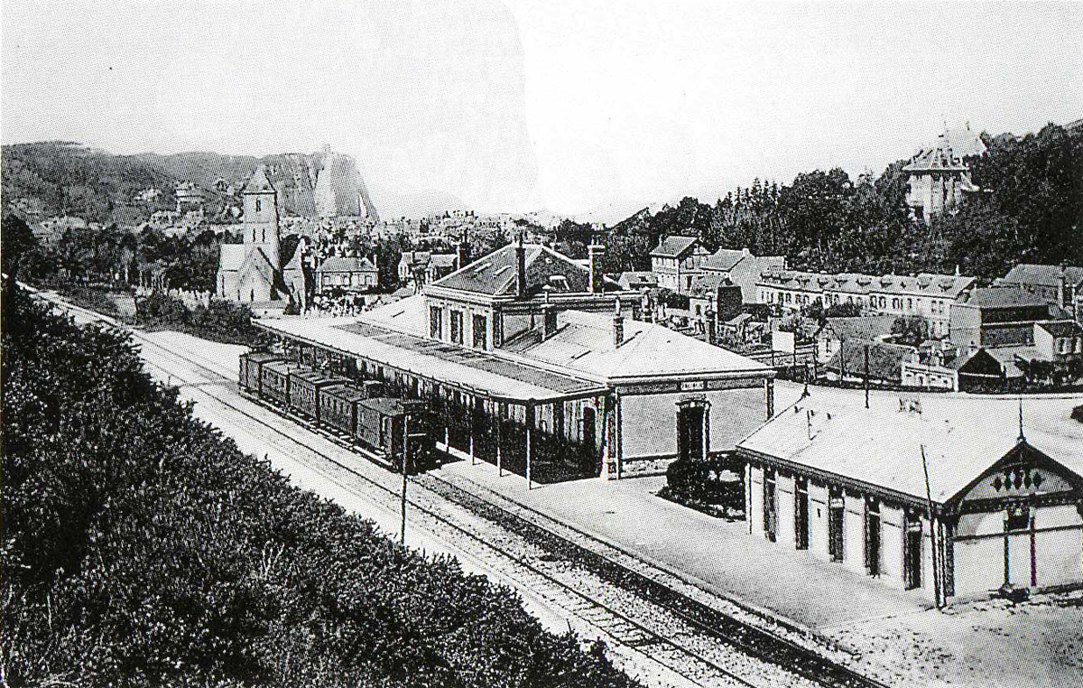 Rame voyageurs en gare d'Etretat au début du XXème siècle.